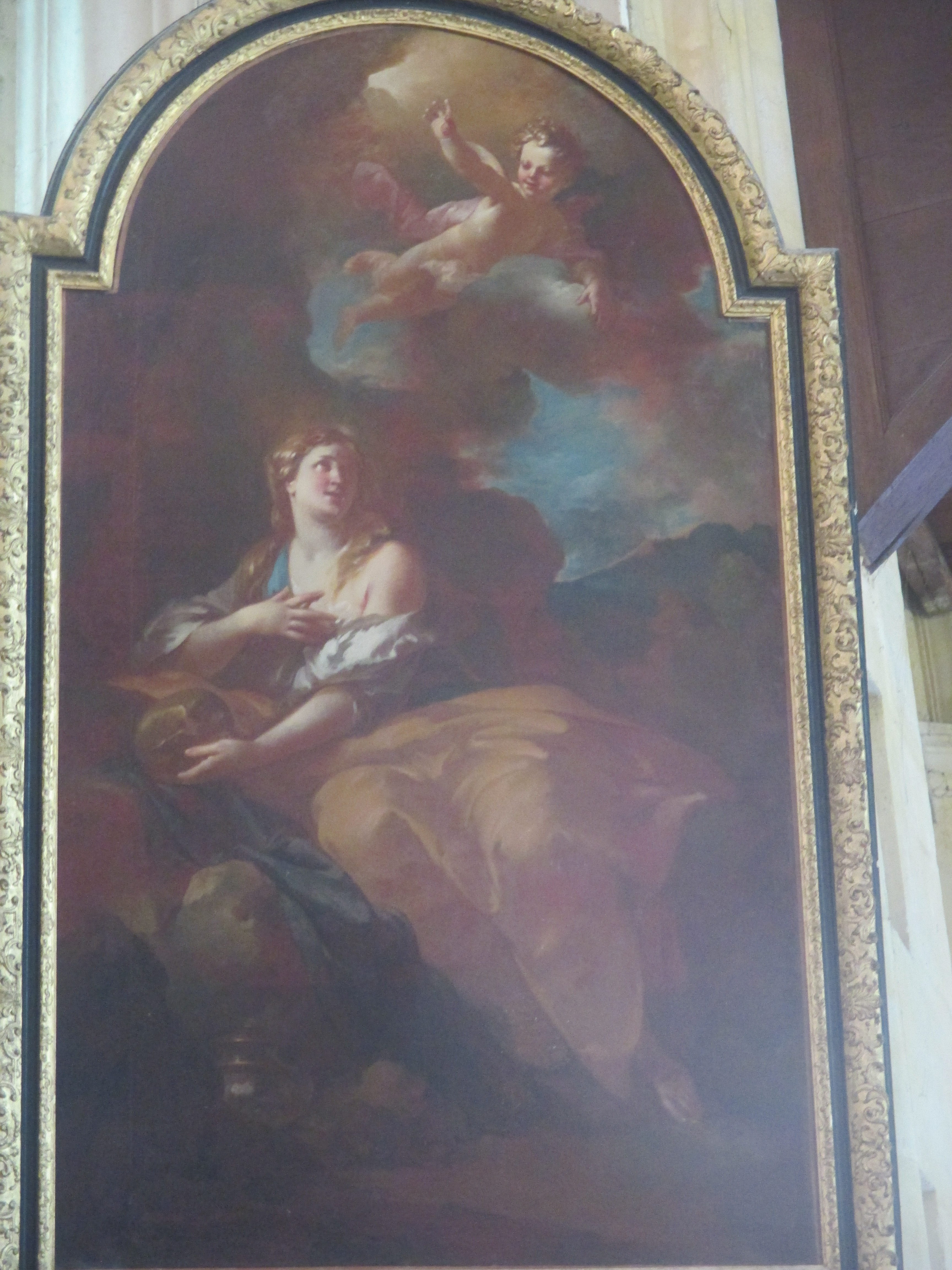 Tableau de Pierre-Jacques Cazes (1676-1754) représentant la Madeleine. Ancienne collection du maréchal de Saxe. Église ND de Villeneuve-sur-Yonne. Classé aux Monuments historiques au titre d'objet (1992).